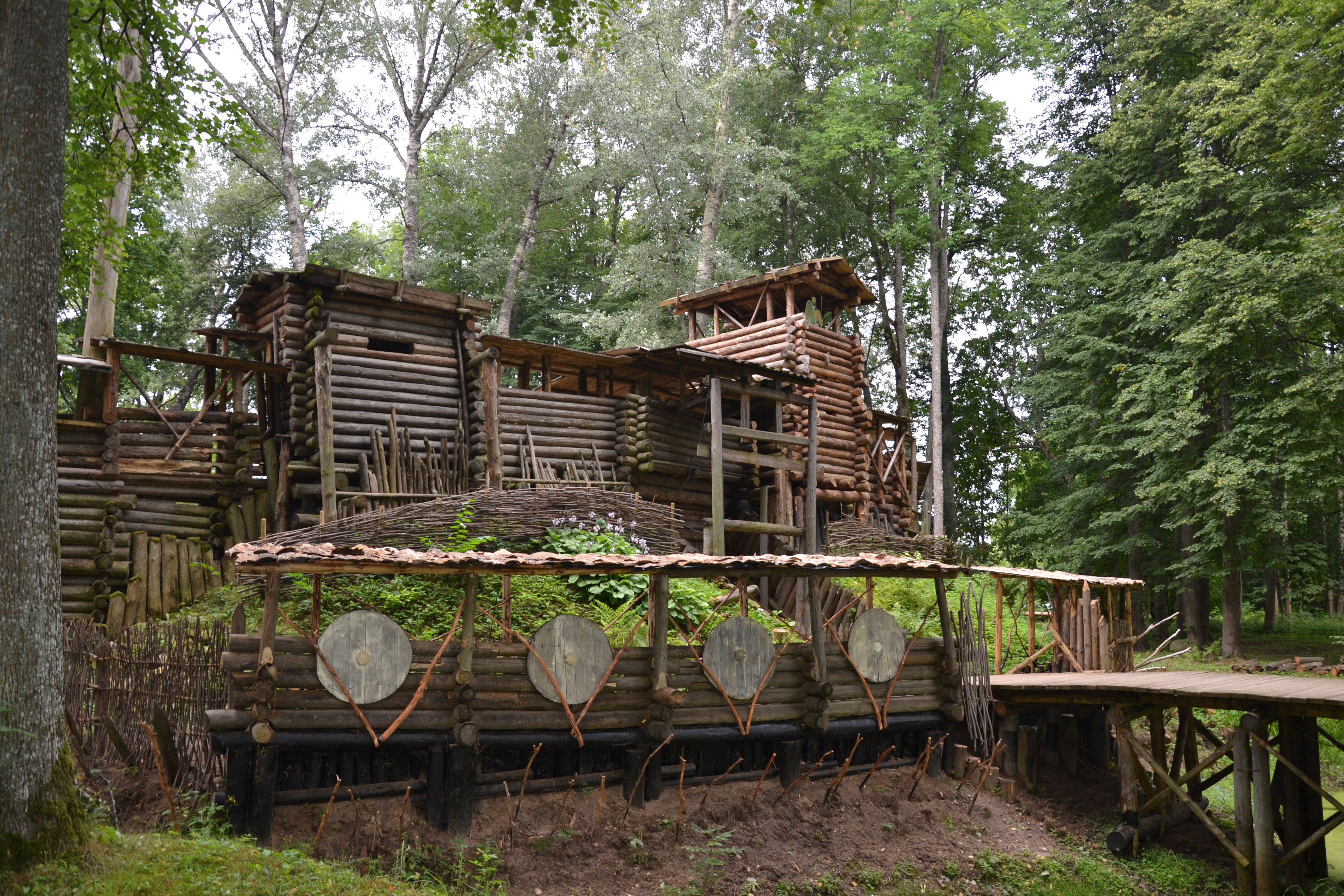 Замок Улдевена в Лиелварде